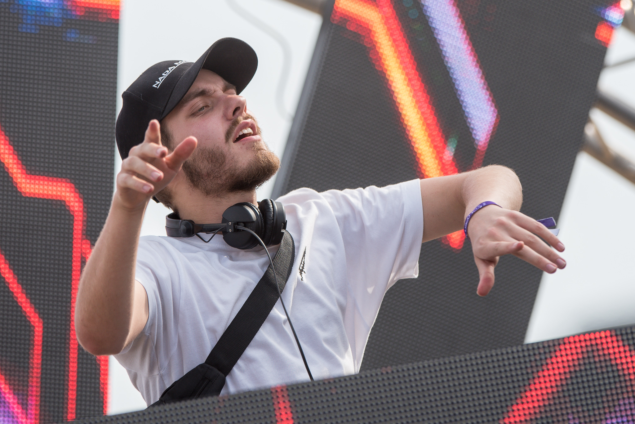 3rd Stage,Festival,Konzert,Livekonzert,Livemusik,Musik,Open Beatz 2016,San Holo,Sander van Dijck